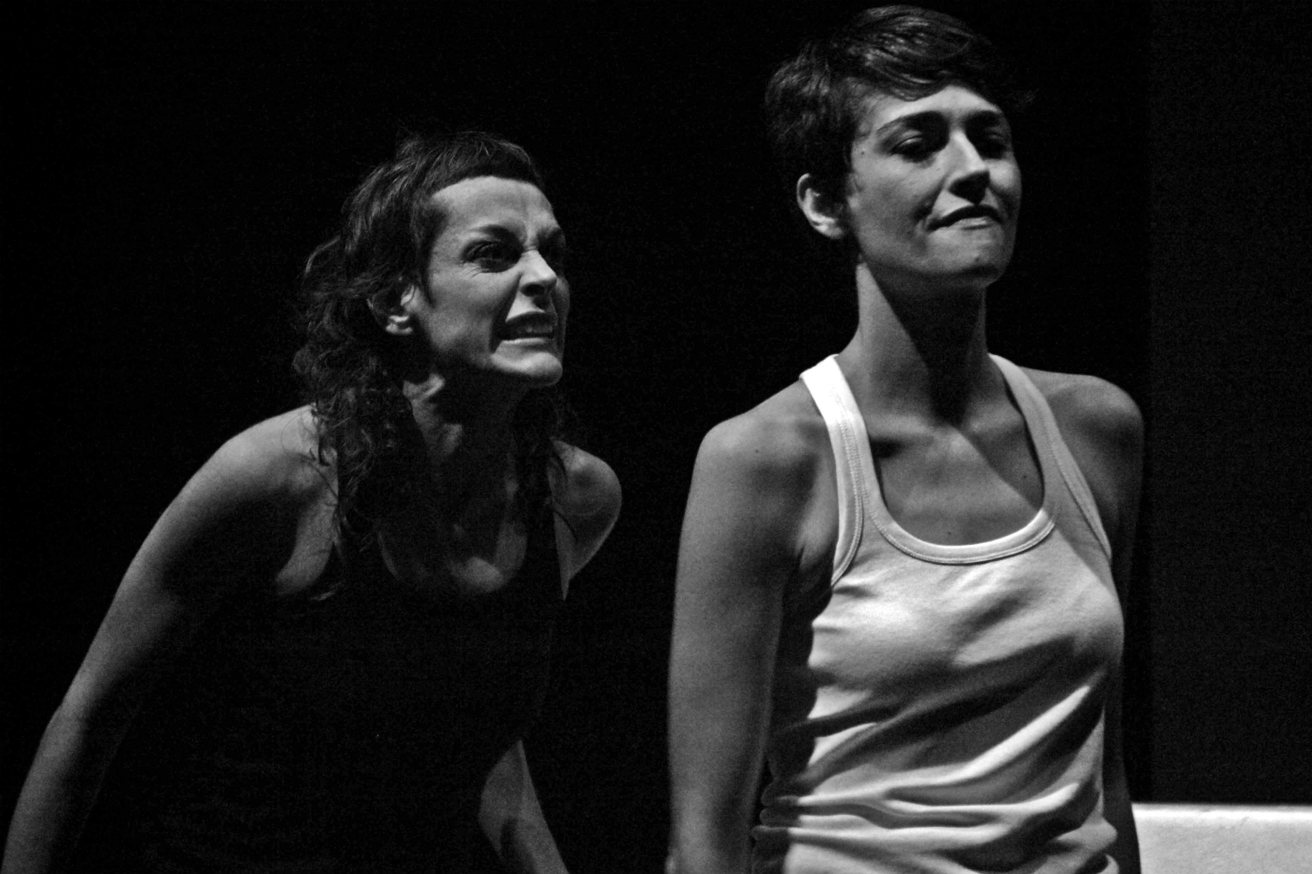 Elisenda Selvas (izquierda) y Montse Martín (derecha) actuando en la obra de teatro Conmovidas en blanco y negro, dirigida por ellas mismas, el 21 de noviembre de 2009